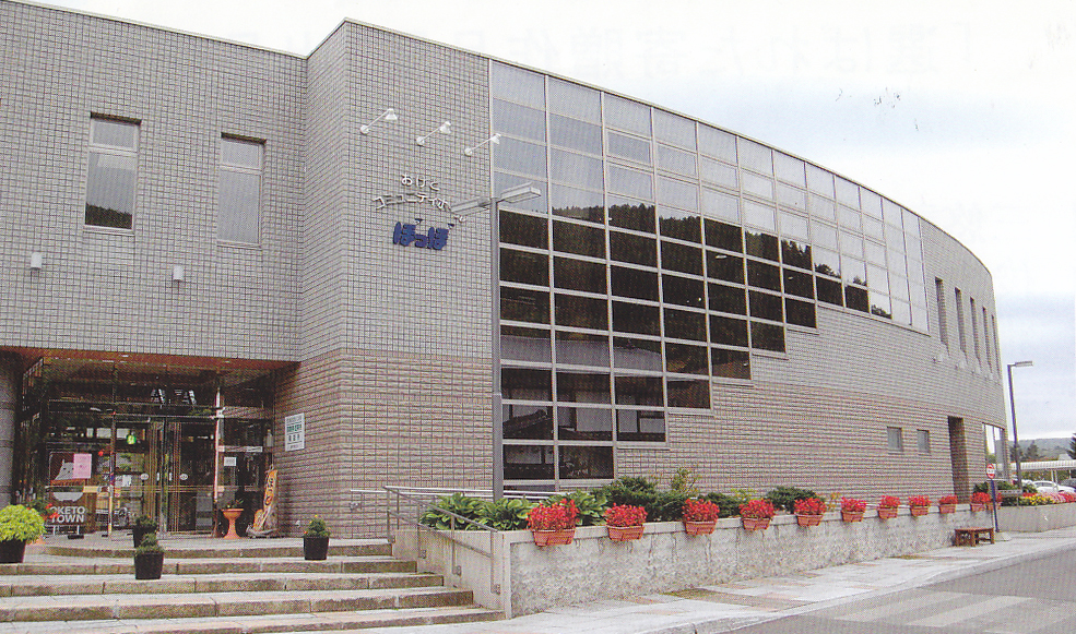 置戸ぽっぽ絵画館(外観)